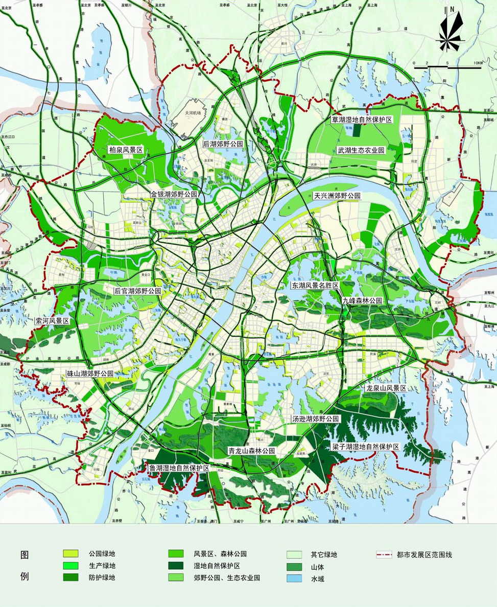 武漢市都市開発エリア緑地系統計画